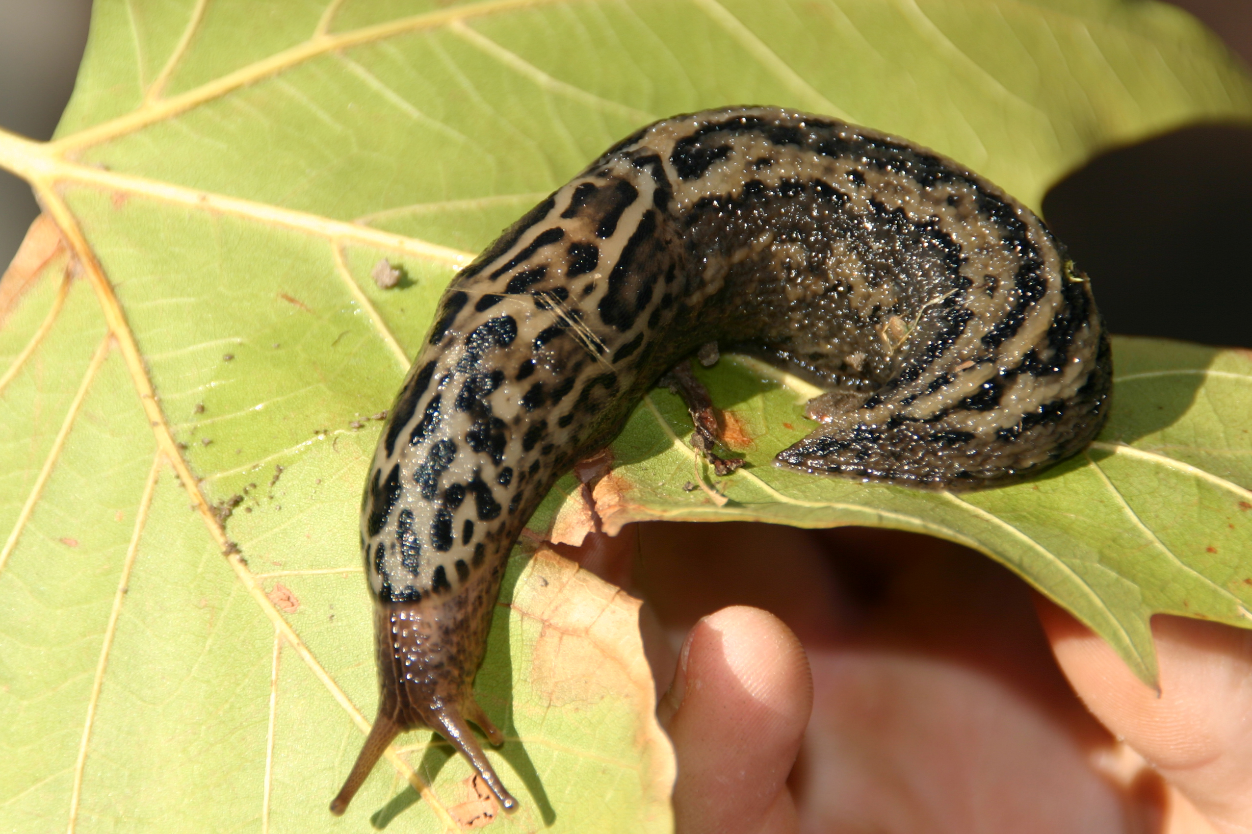 letzten Herbst entdeckte unser Nachbarjunge diese Schnecke im Garten. Wir haben uns dann schlau gemacht. Es soll ein Tigerschnegel sein.